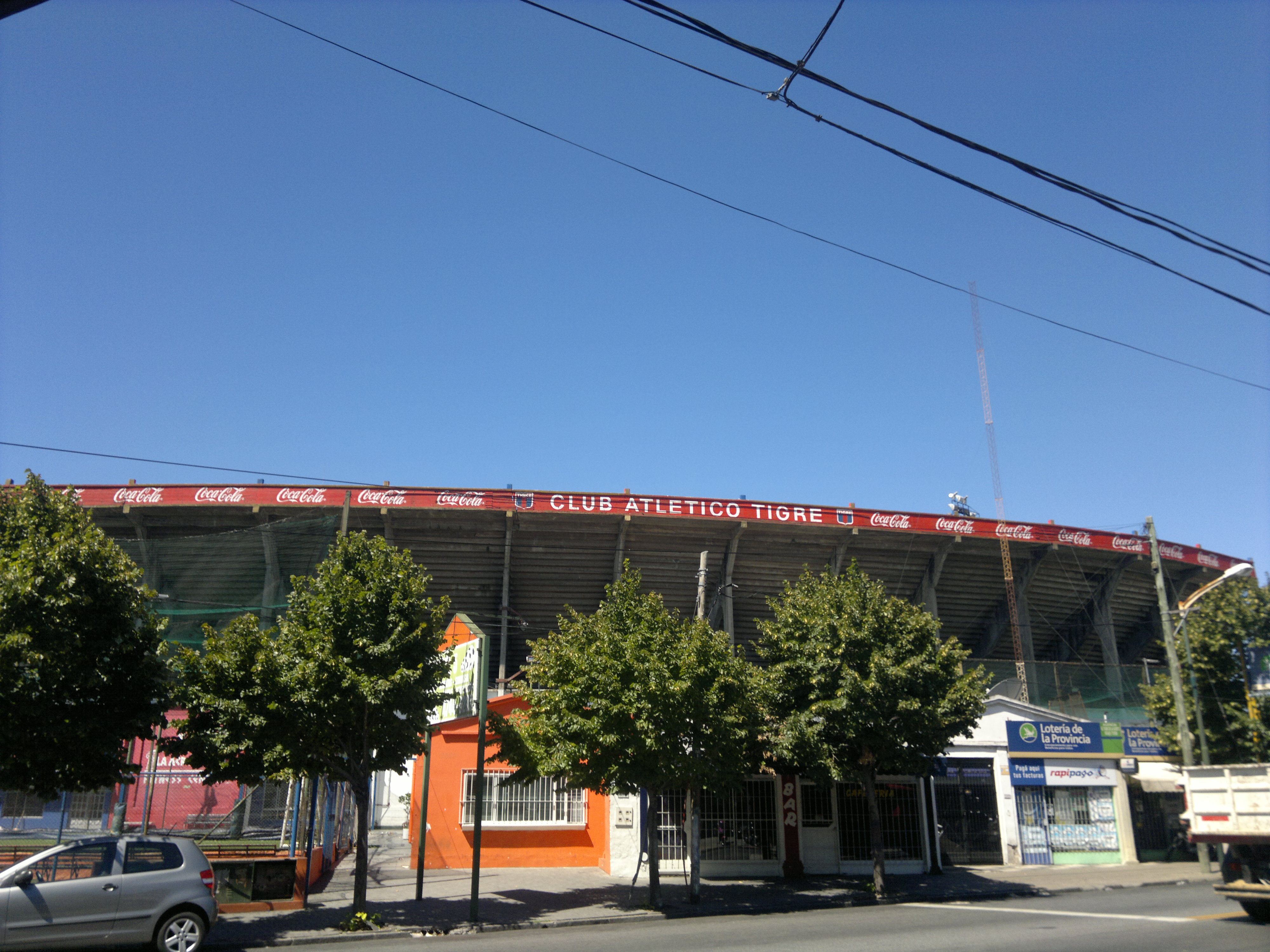 Estadio Monumental de Victoria